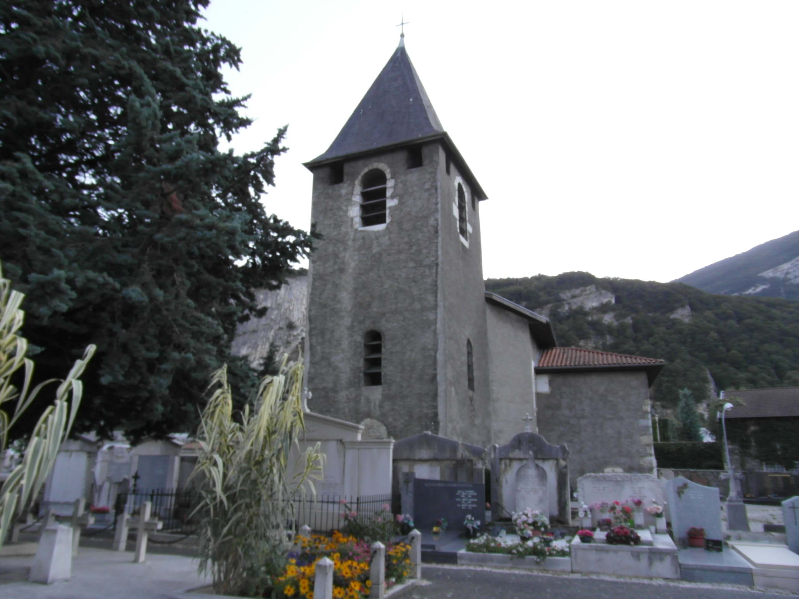 Eglise de la nativité de Fontaine